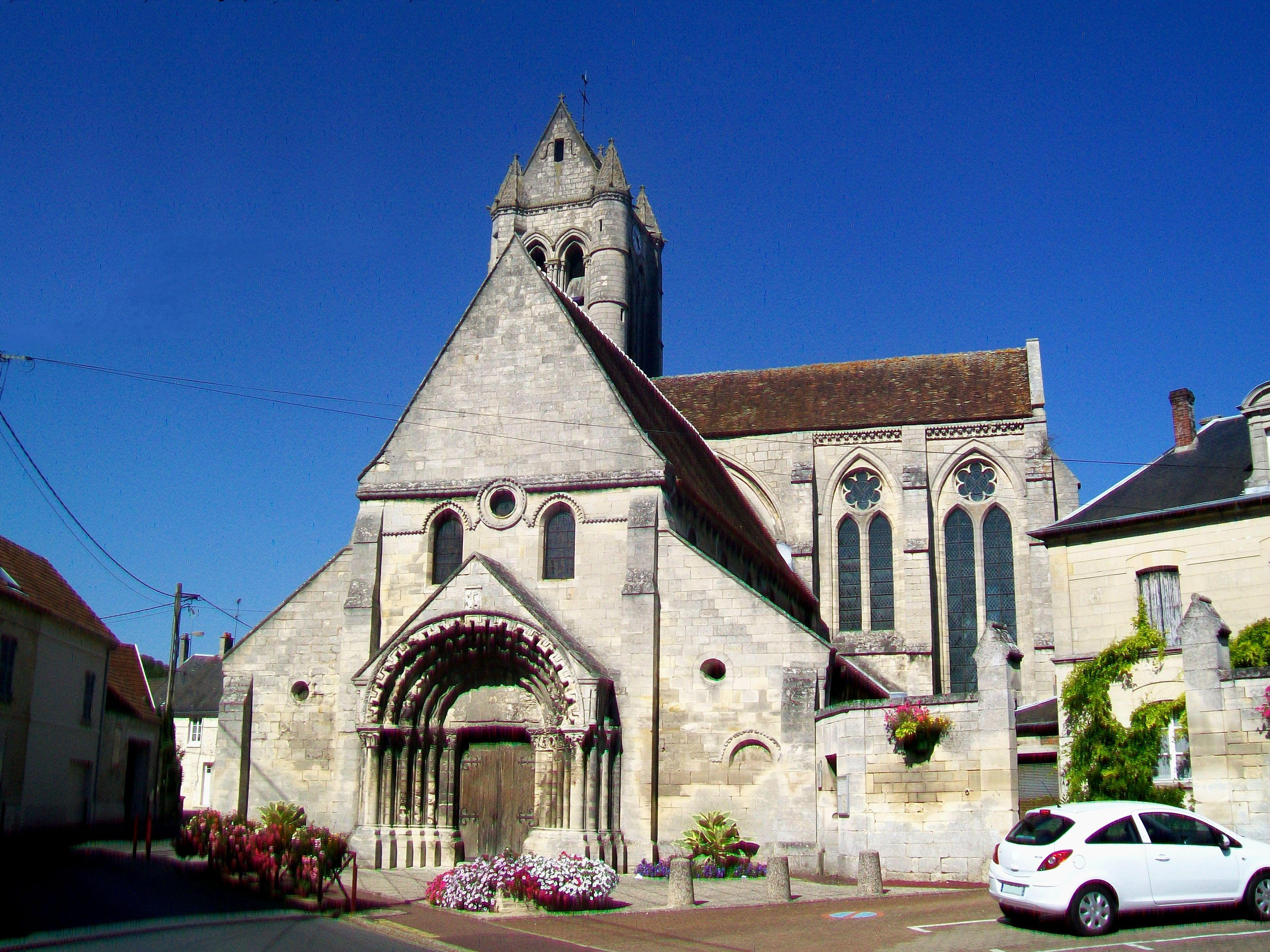 Église Saint-Pierre-et-Saint-Paul de Villers-Saint-Paul, façade occidentale.